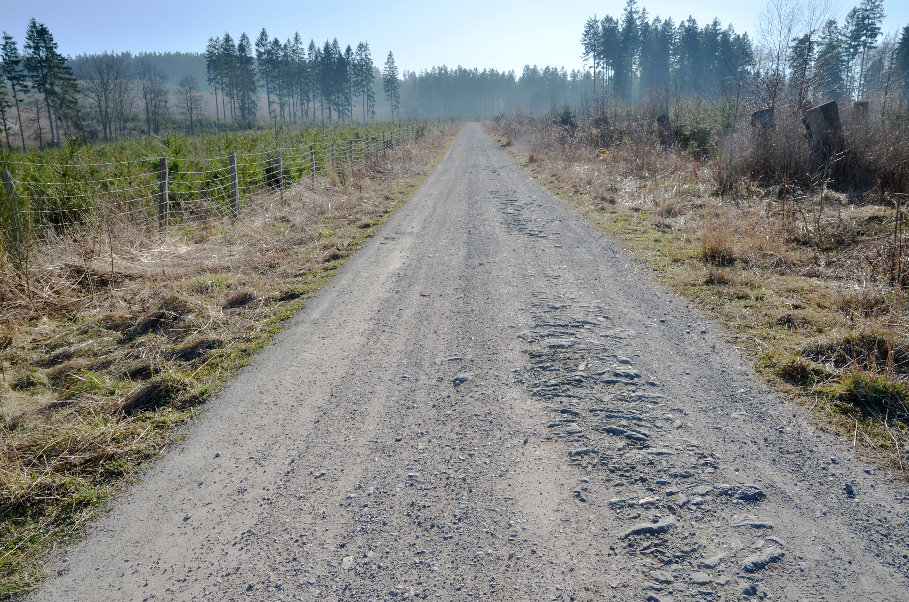 7 Jahre nach Kyrill sind brach liegende-, zum Aufforsten vorbereitete- und aufgeforstete Flächen zu betrachten.